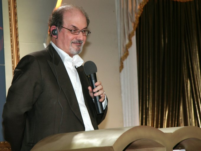 Salman Rushdie